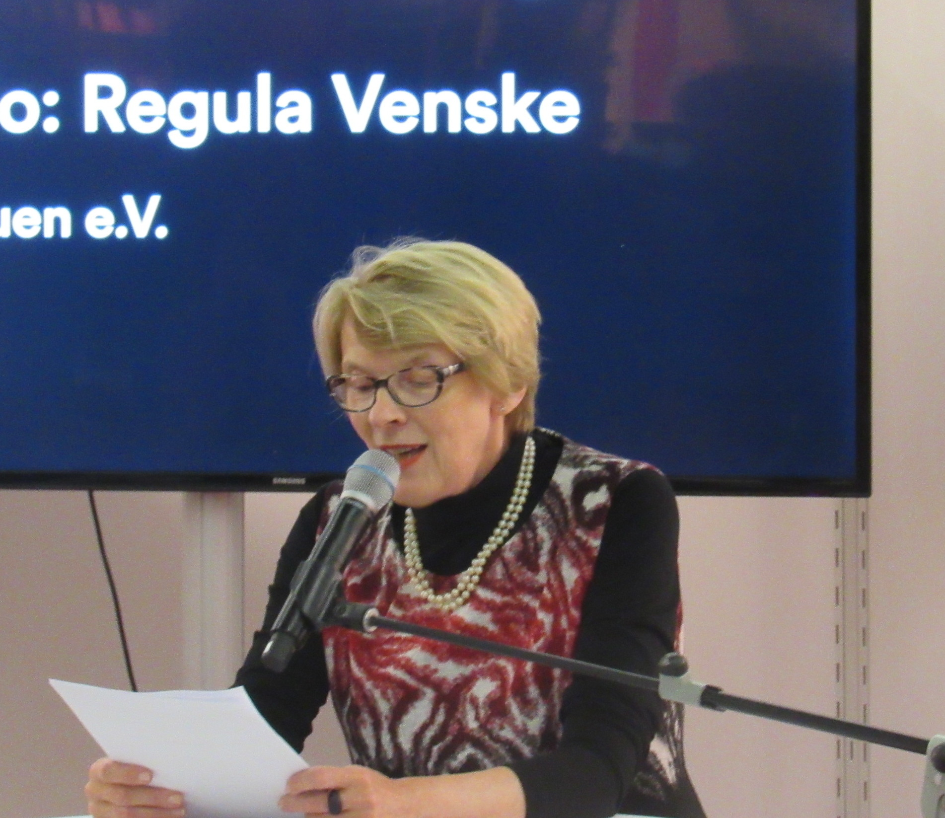 Regula Venske (* 12. Juni 1955 in Minden) ist eine deutsche Schriftstellerin und Literaturwissenschaftlerin The making of this document was supported by the Community-Budget of Wikimedia Germany.